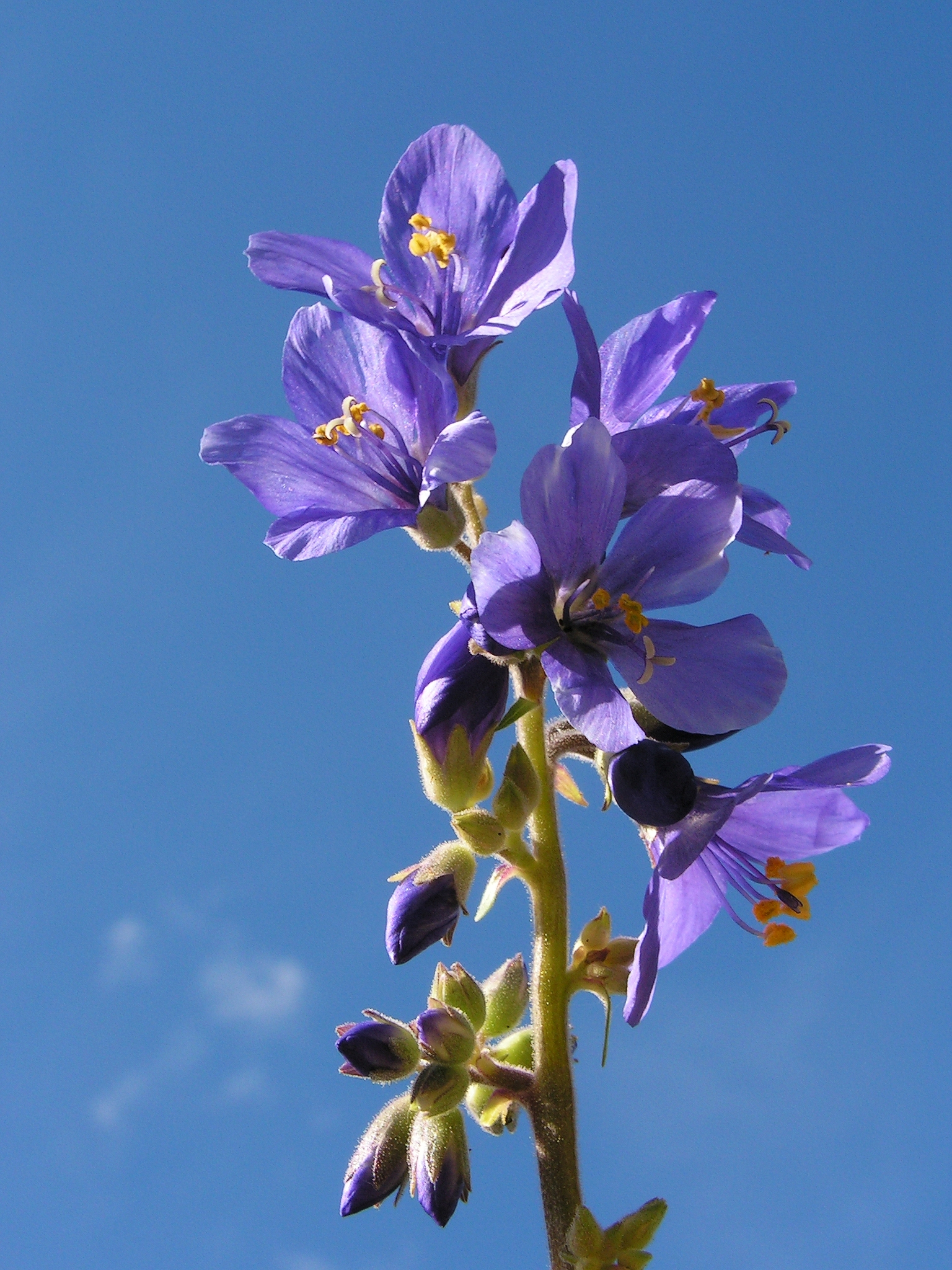 Polemonium caeruleum L. Moscow region, Russia.